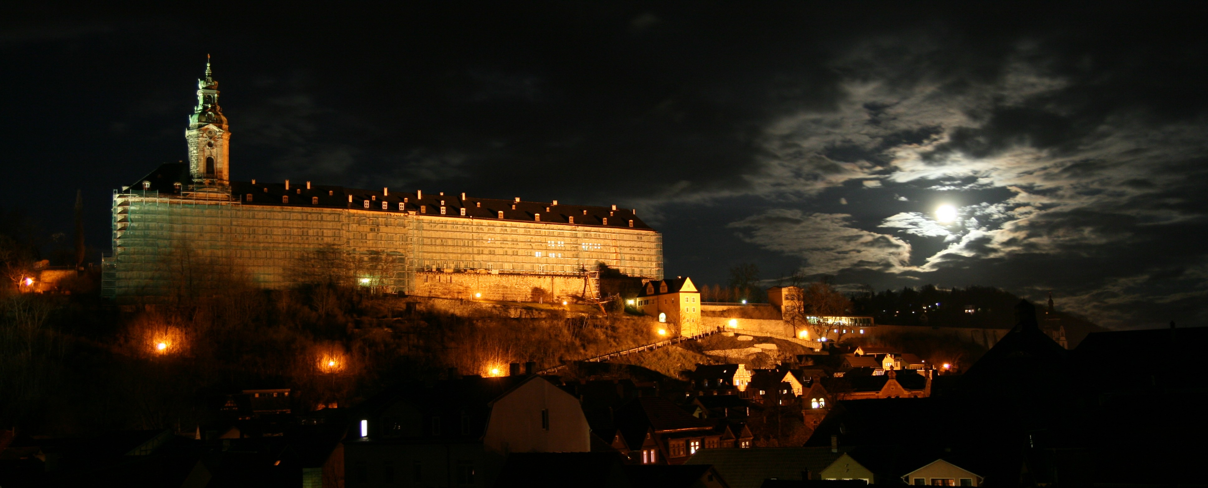 Heidecksburg, Rudolstadt, Deutschland